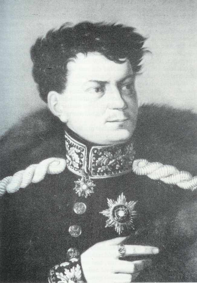 Karl Albrecht Friedrich Julius von den Brinken, der Jüngere (or von den Brincken; 1789-1846), German forester (forestry scientist) and Polish general conservator of forests / Karl Albrecht Friedrich Julius von den Brinken, der Jüngere (auch von den Brincken; 1789-1846), deutscher Forstmann (Forstwissenschaftler) und polnischer Generalforstmeister